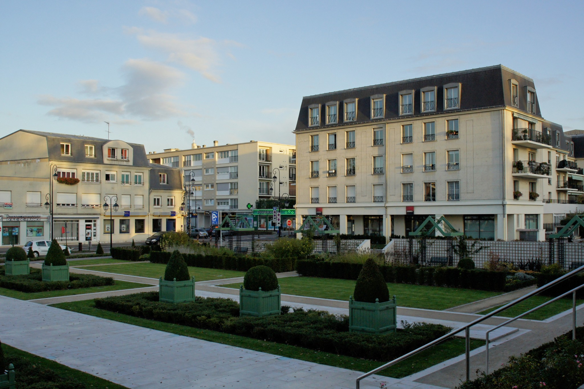 Centre ville du Plessis-Trévise vu depuis le parvis de l'hôtel de ville, dans le Val-de-Marne, en France. À gauche, l'avenue Ardouin.